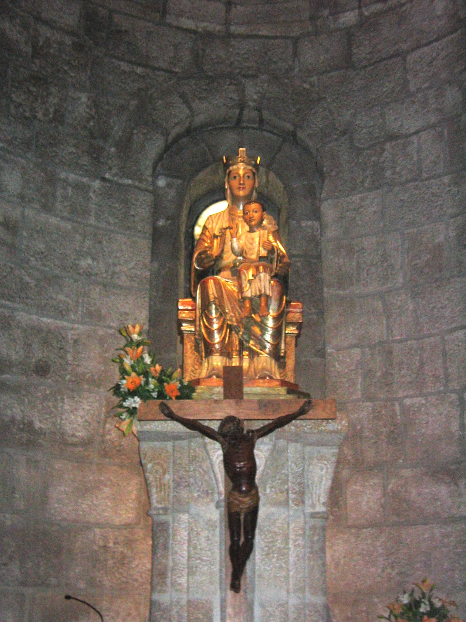 Monasterio de Leyre, inetrior de la iglesia, Yesa, Navarra (España).